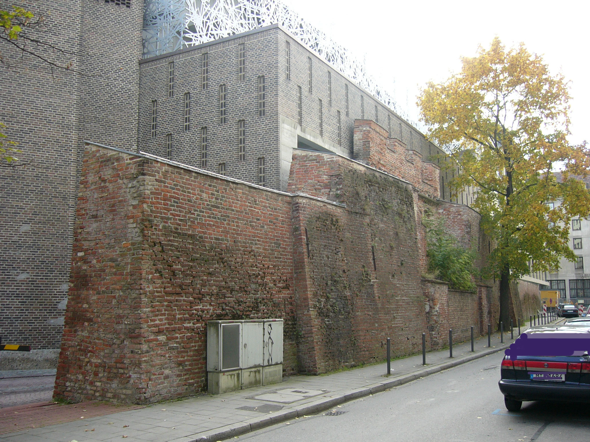 Ehem. Stadtmauer München, Jungfernturmstraße.